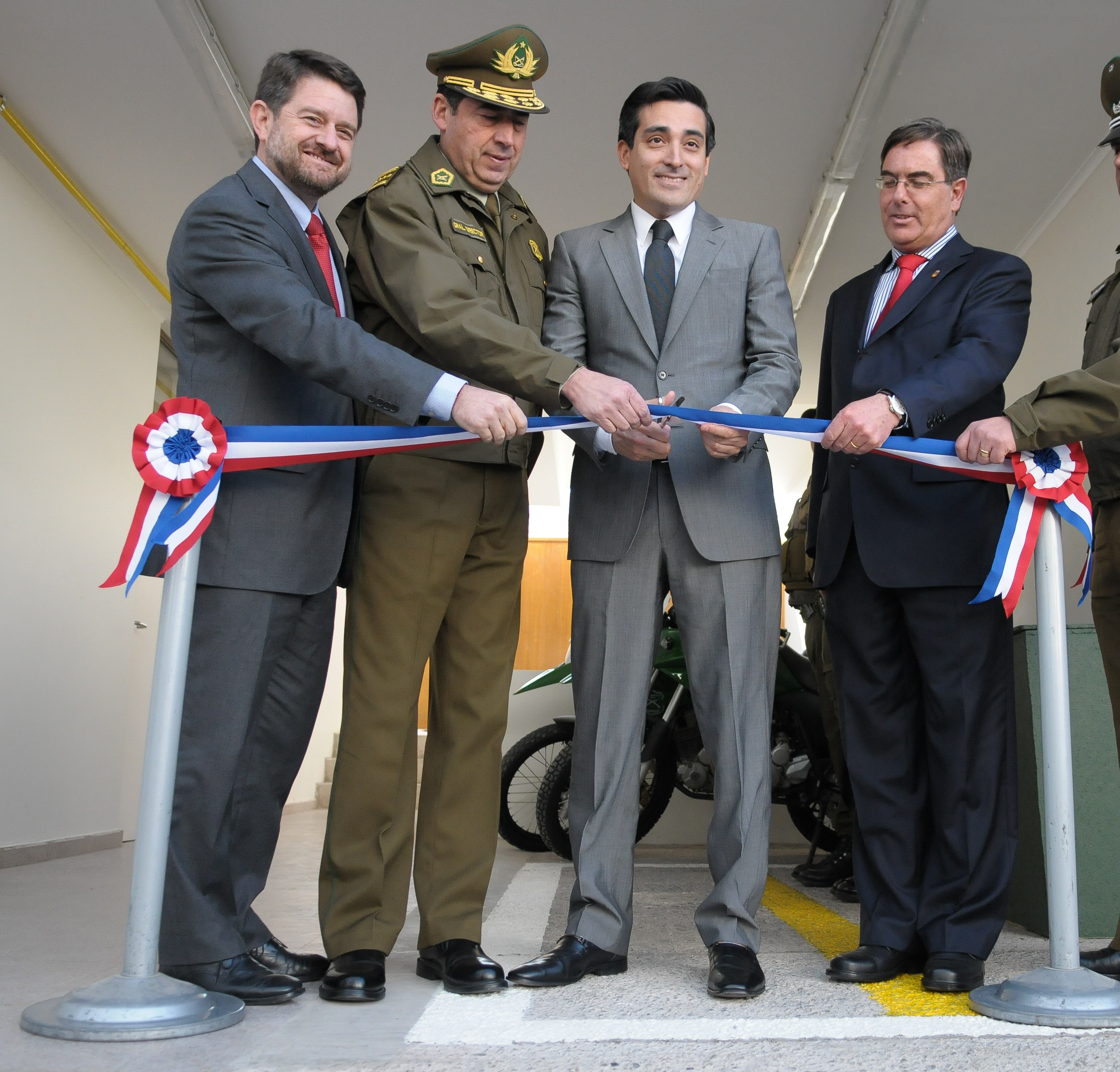 El Vicepresidente de la República, Rodrigo Peñailillo, junto al General Director de Carabineros, Gustavo González; el intendente Metropolitano, Claudio Orrego; y el alcalde Pirque, Cristián Balmaceda, inauguraron la subcomisaría de Pirque.